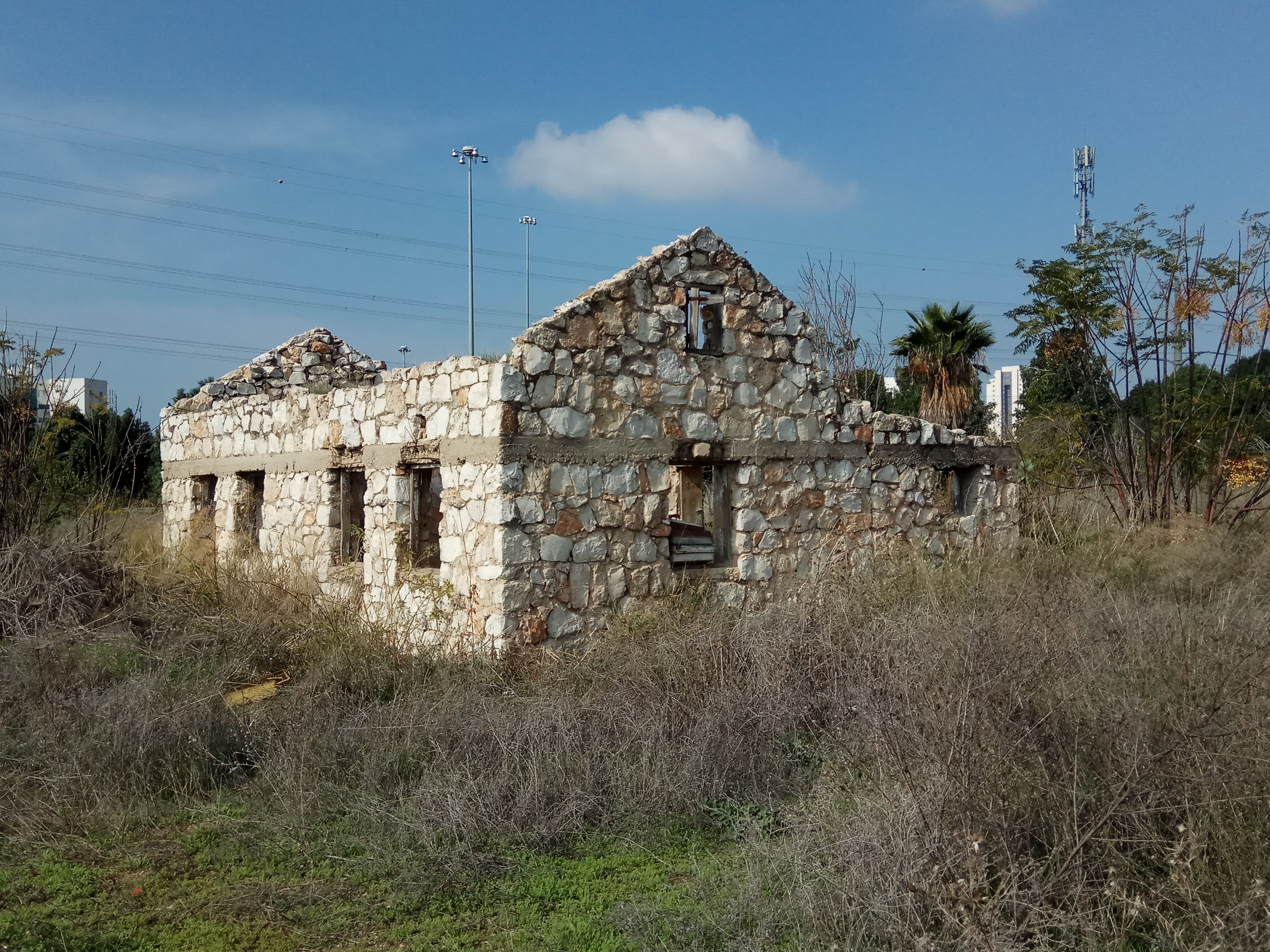 בית משפחת שוורץ בפרדס גוט בכפר אזר